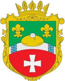 Герб Гощанського району